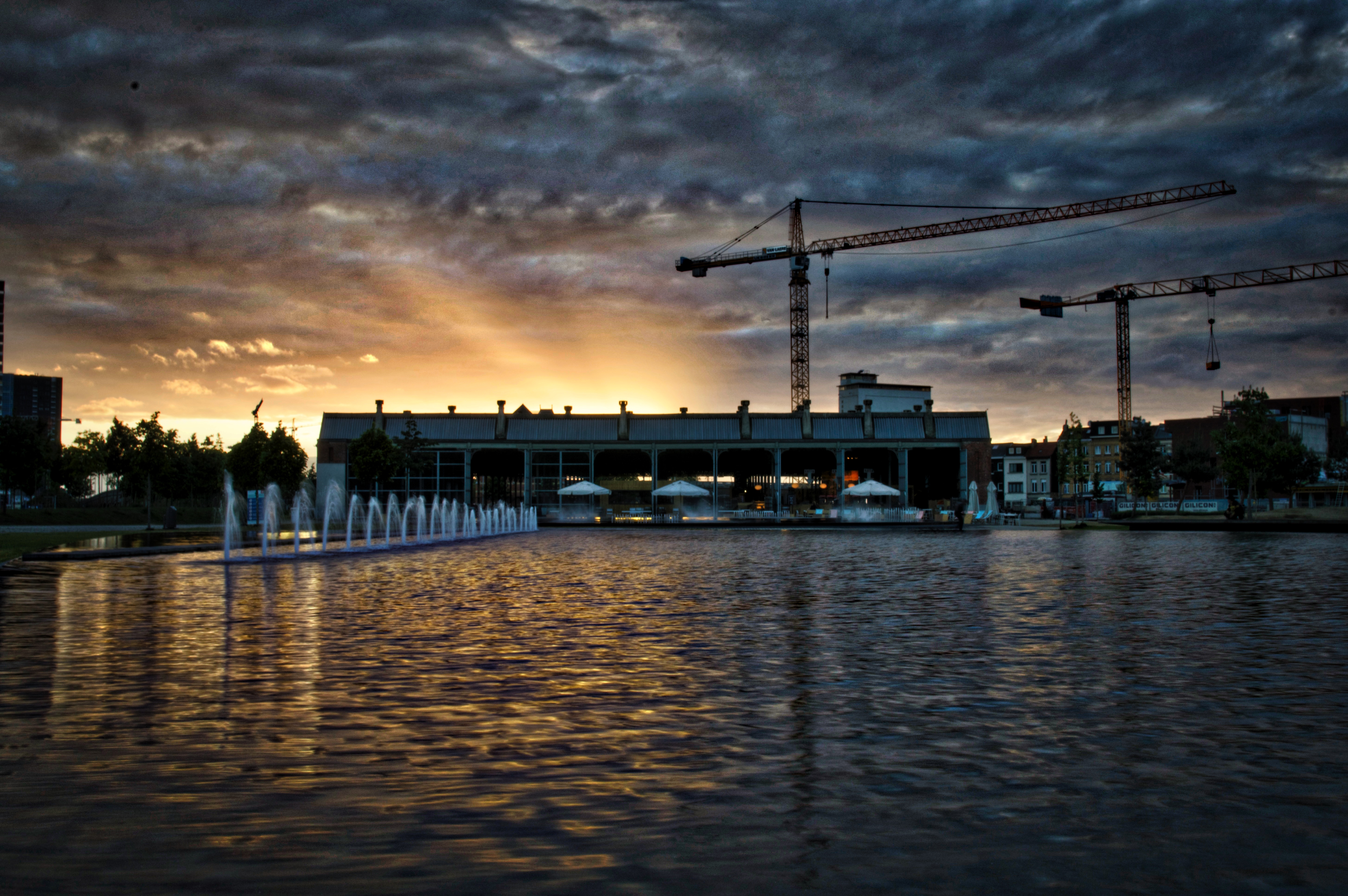 De Cargo zomerbar